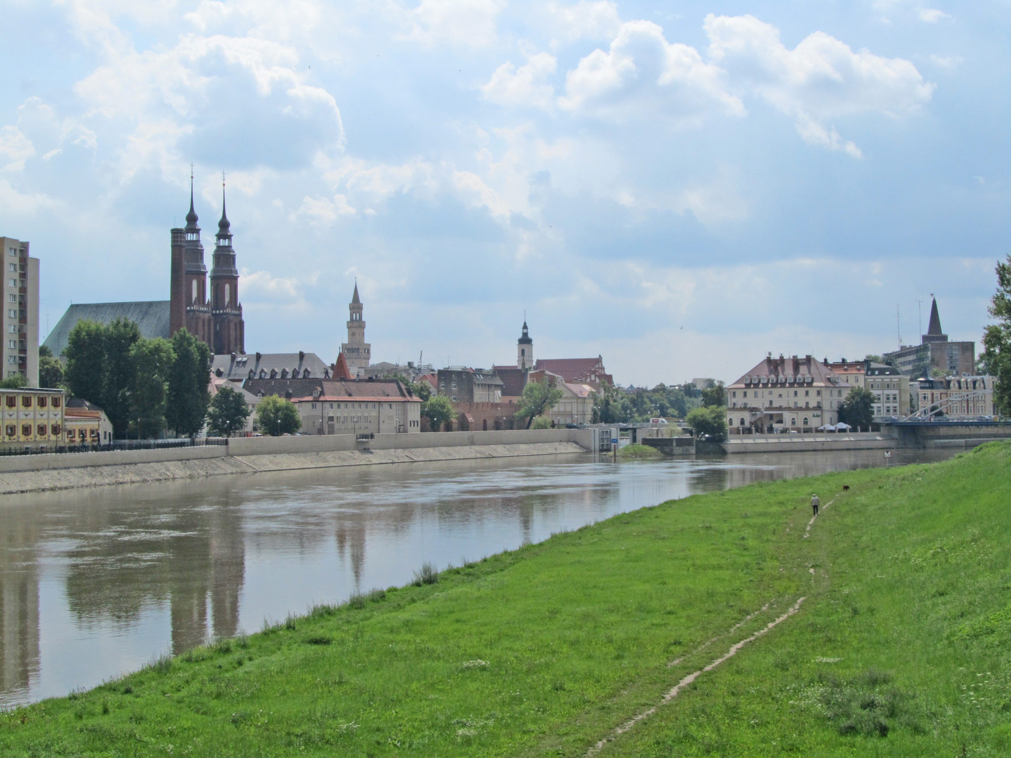 Oderpanorama mit Kathedrale, Rathaus, Franziskanerkirche und Piastenturm